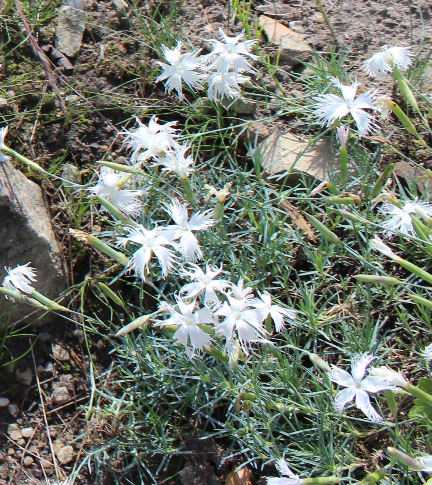 Dianthus lumnitzeri Botanischer Garten Berlin-Dahlem